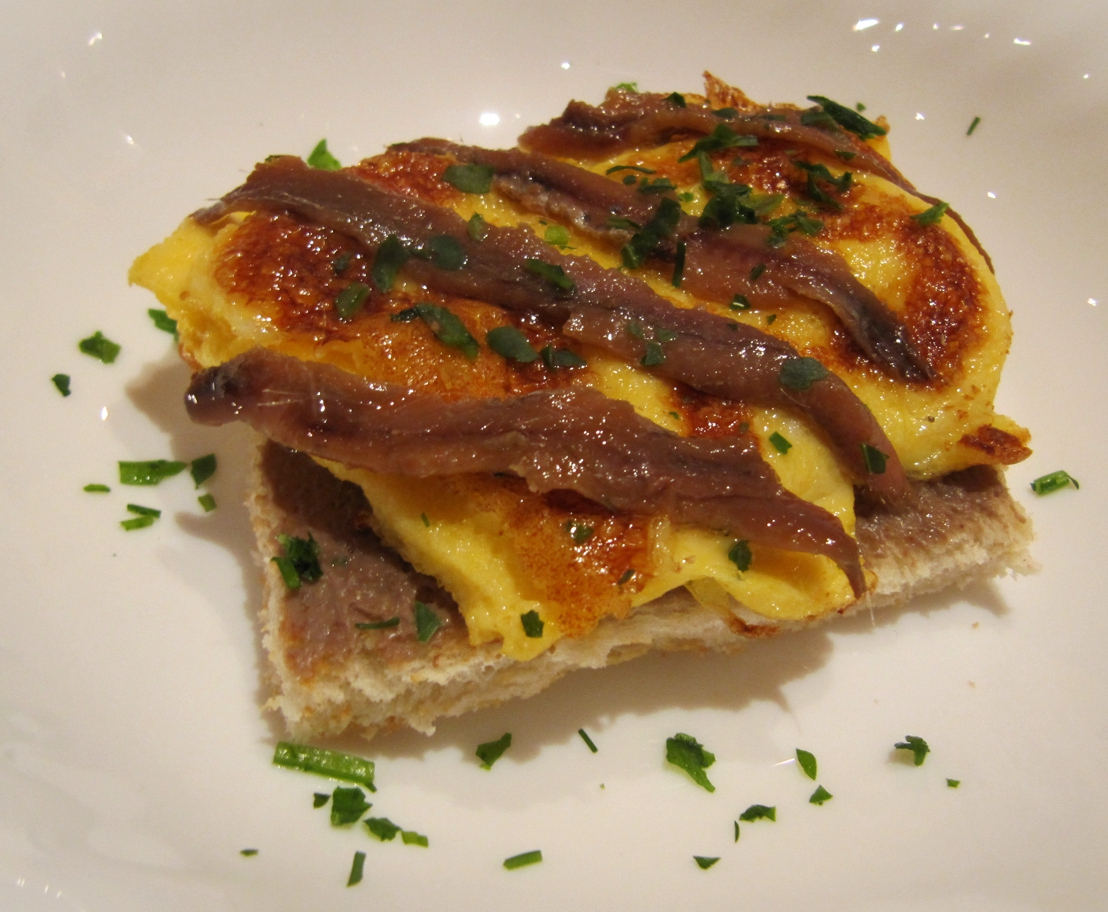 Nahaufnahme Scotch woodcock